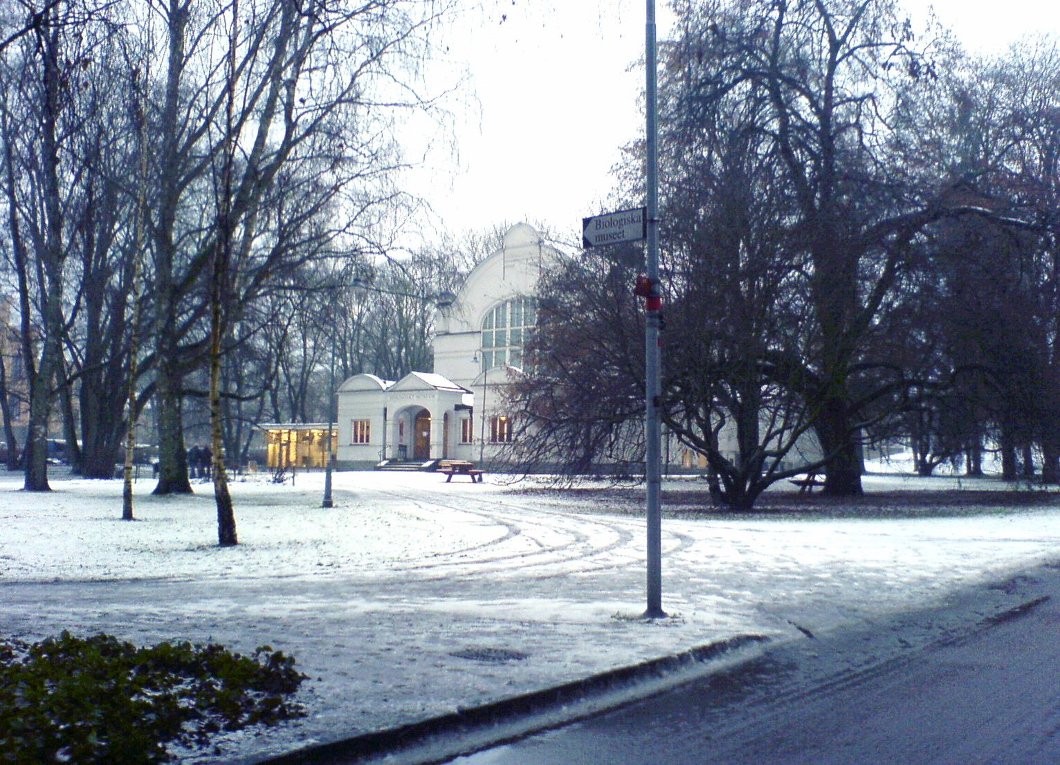 buildings in Uppsala, Biologiska in City